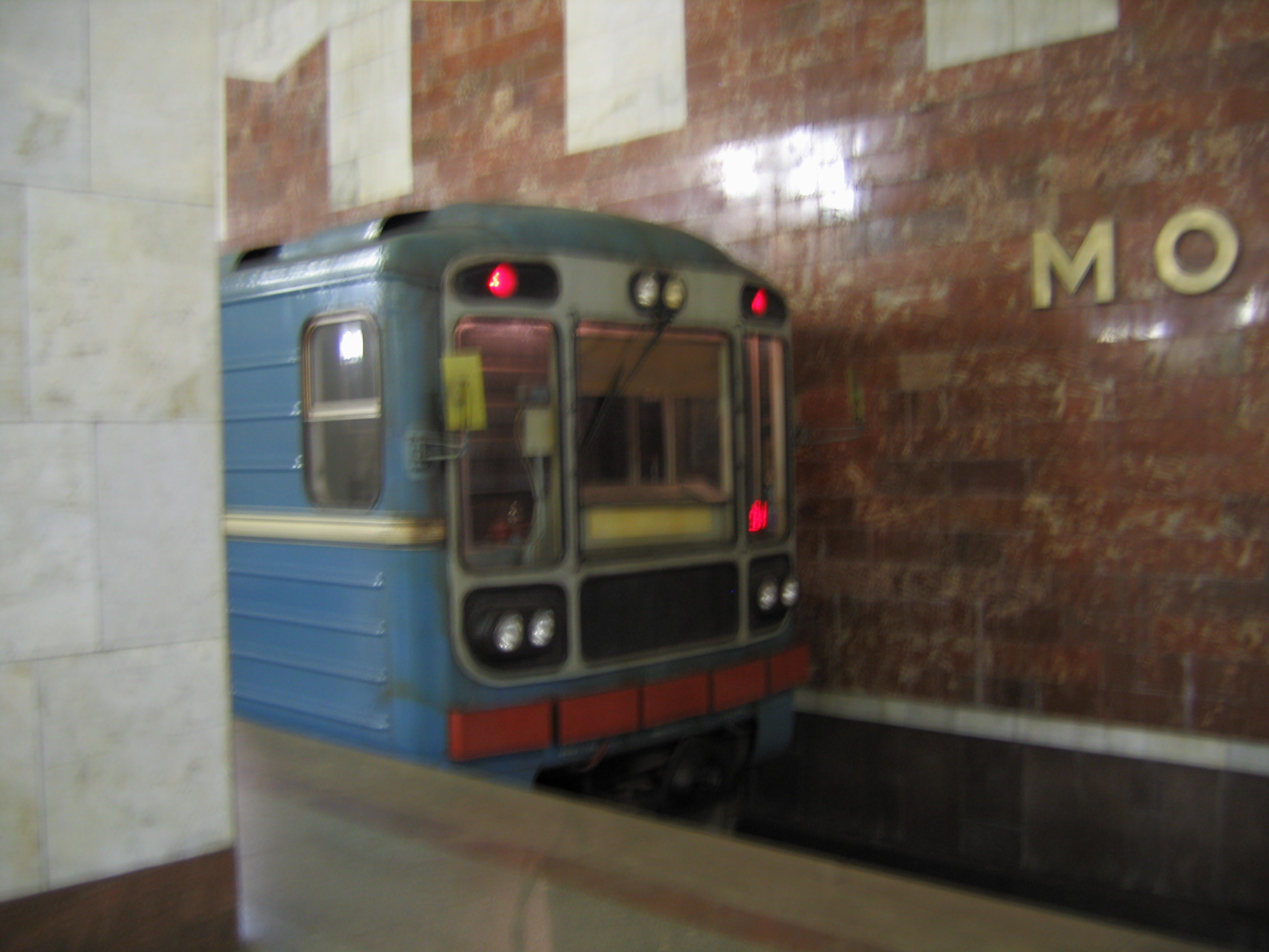 Moskovskaya metro station in Nizhny Novgorod